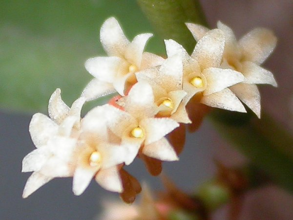 Campylocentrum neglectum - São Paulo